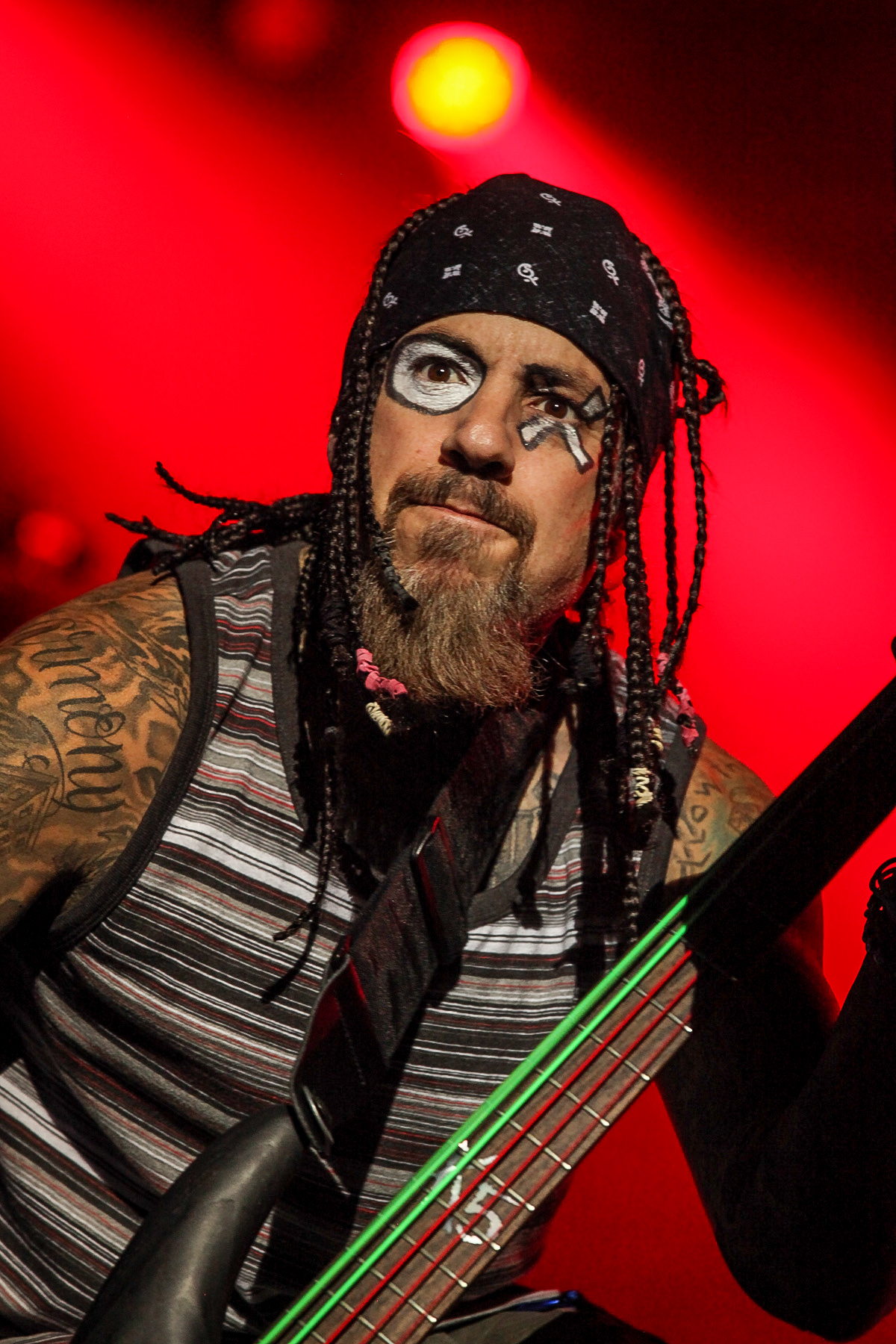 Korn Bassist Reginald „Fieldy“ Arvizu bei seinem Auftritt auf dem Rock im Park Festival 2013 in Nürnberg